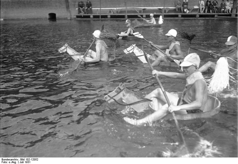 Lustiges Badewannen-Rennen! In Waschfässern, mit Pferdeköpfen versehen, sitzen die Jungens und paddeln um die Wette. Die lustigsten Szenen spielen sich bei einem solchen Wettschwimmen ab.